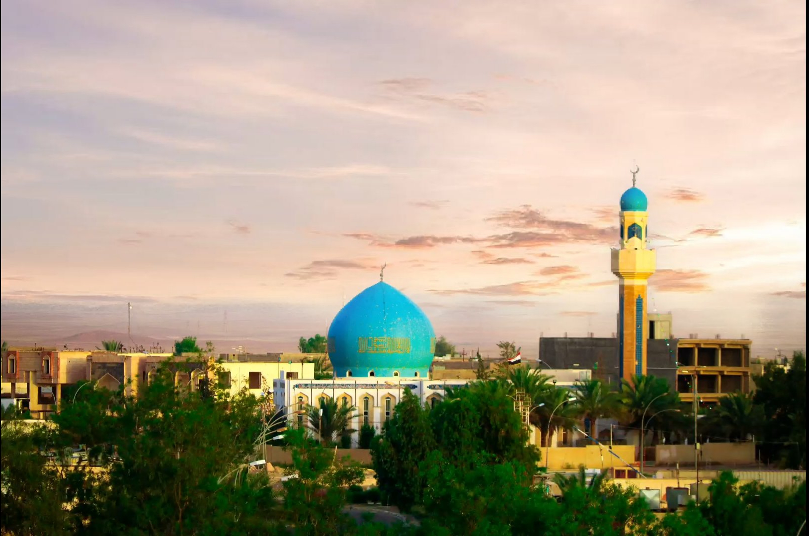 موقع أثري